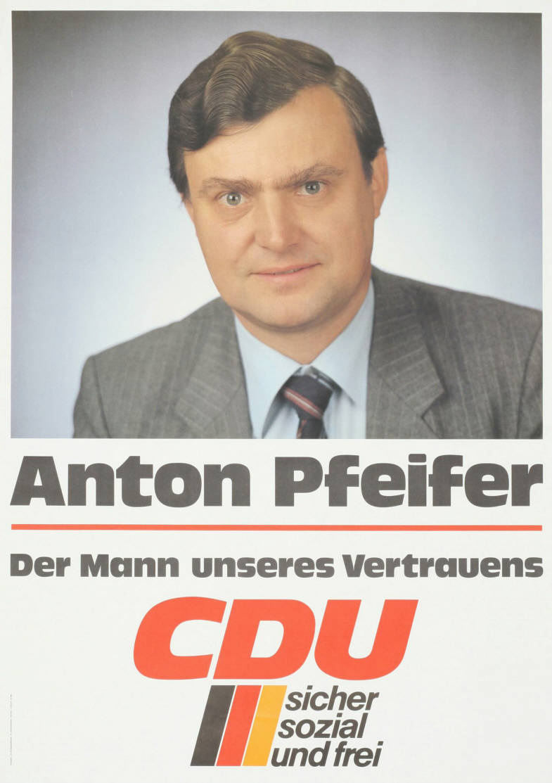 Anton Pfeifer Der Mann unseres Vertrauens CDU sicher sozial und freiAbbildung:PorträtfotoPlakatart:Kandidaten-/Personenplakat mit PorträtAuftraggeber:CDU-Bundesgeschäftsstelle, Abt. Öffentlichkeitsarbeit, BonnObjekt-Signatur:10-001: 2648Bestand:Plakate zu Bundestagswahlen (10-001)GliederungBestand10-18:Plakate zu Bundestagswahlen (10-001) » Die 10. Bundestagswahl am 6. März 1983 » CDU » Mit PorträtfotoLizenz:KAS/ACDP 10-001: 2648 CC-BY-SA 3.0 DE